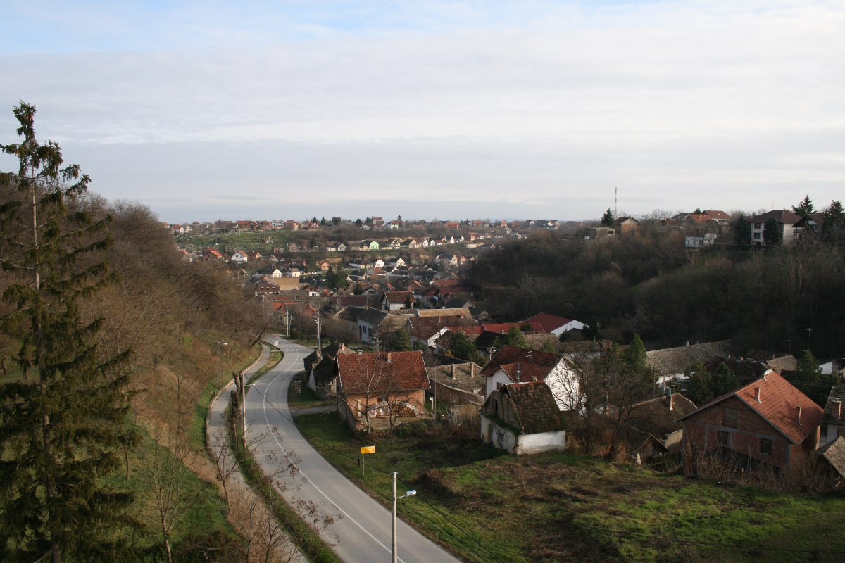 U Iloku